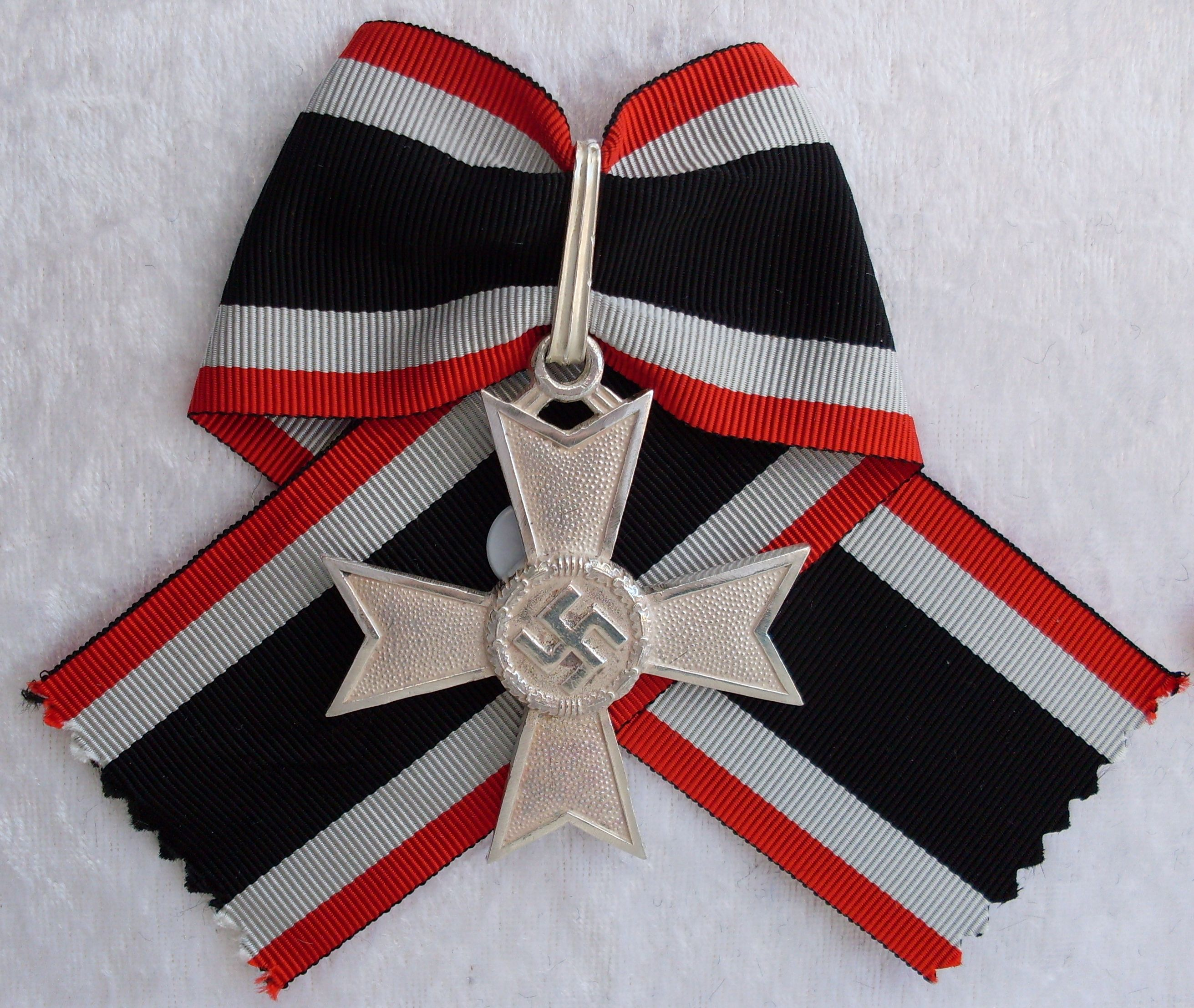 Ritterkreuz des KVK ohne Schwerter; Replik